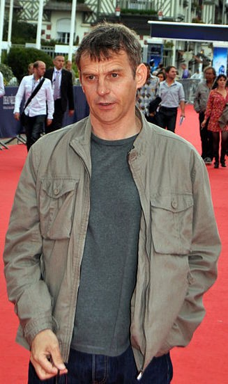 Lucas Belvaux au festival de Deauville